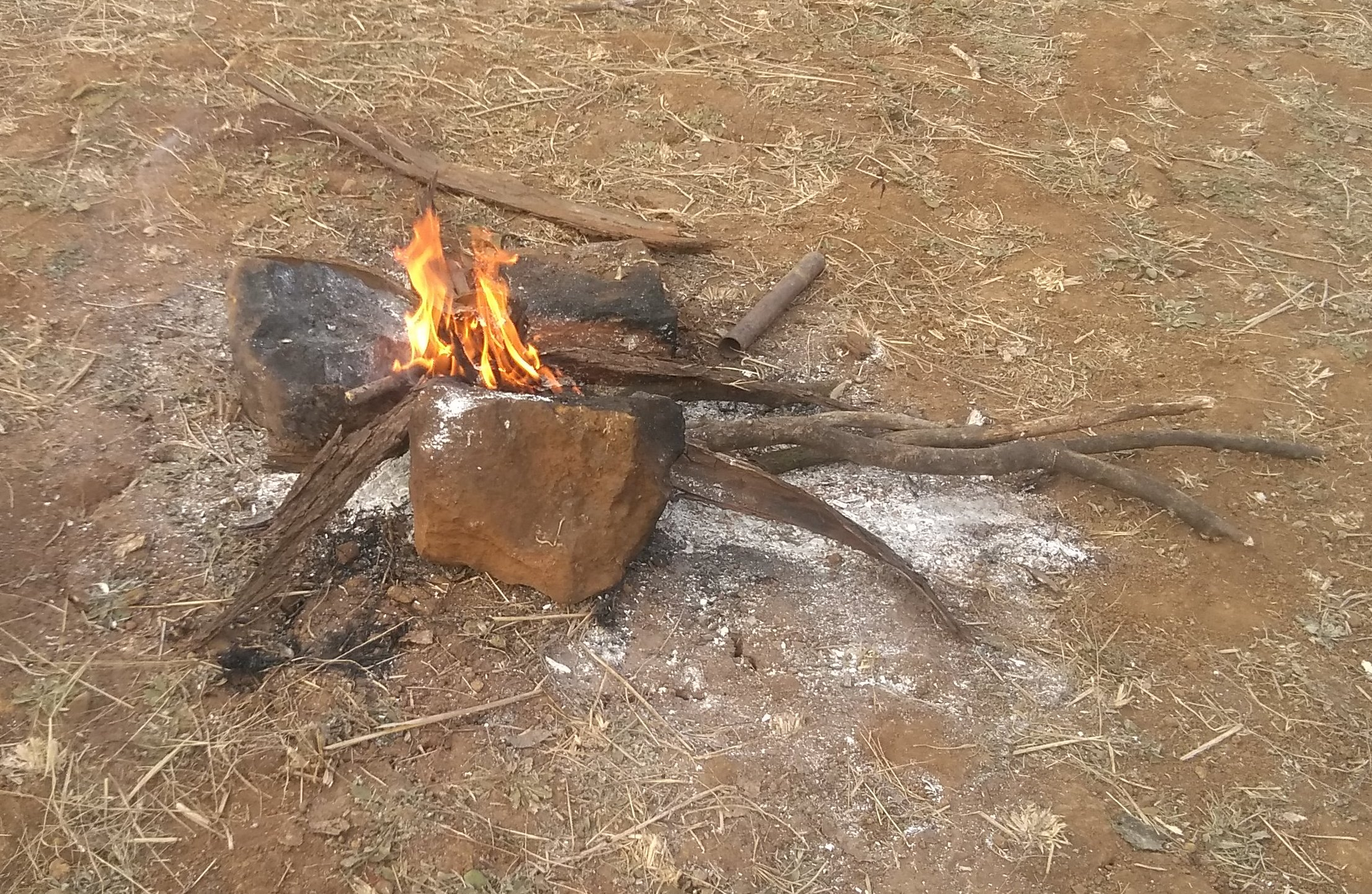 तीन दगडांची चूल